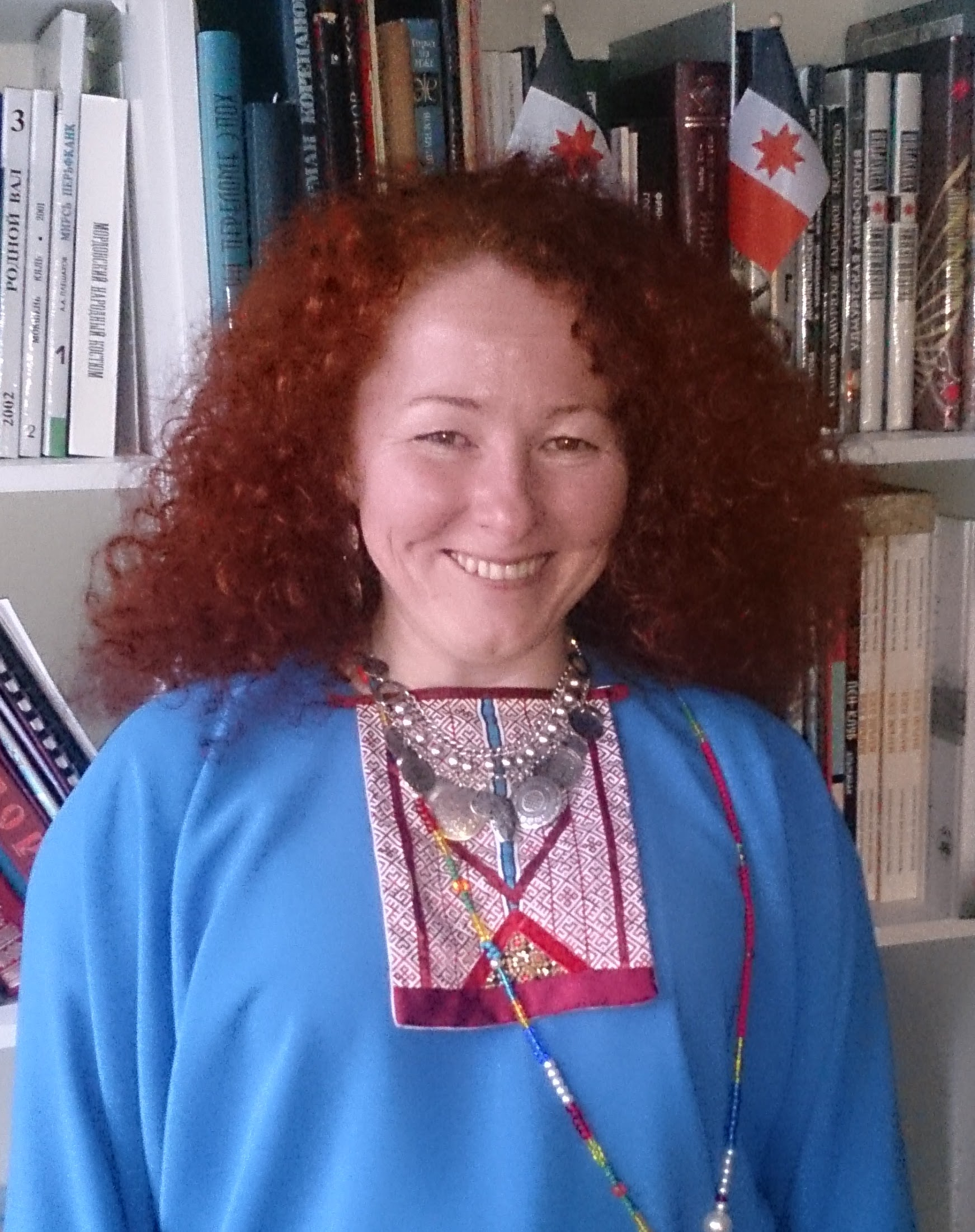 Muš Nadii, udmurdi luuletaja